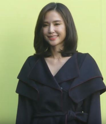 16일 오전 서울시 중구 동대문디자인플라자(DDP)에서 '2020 S/S 서울패션위크(SEOUL FASHION WEEK S/S 2020)' 까이에(CAHIERS) 김아영 디자이너의 컬렉션이 열려 유선X공현주가 참석해 포토타임을 갖고 있다.